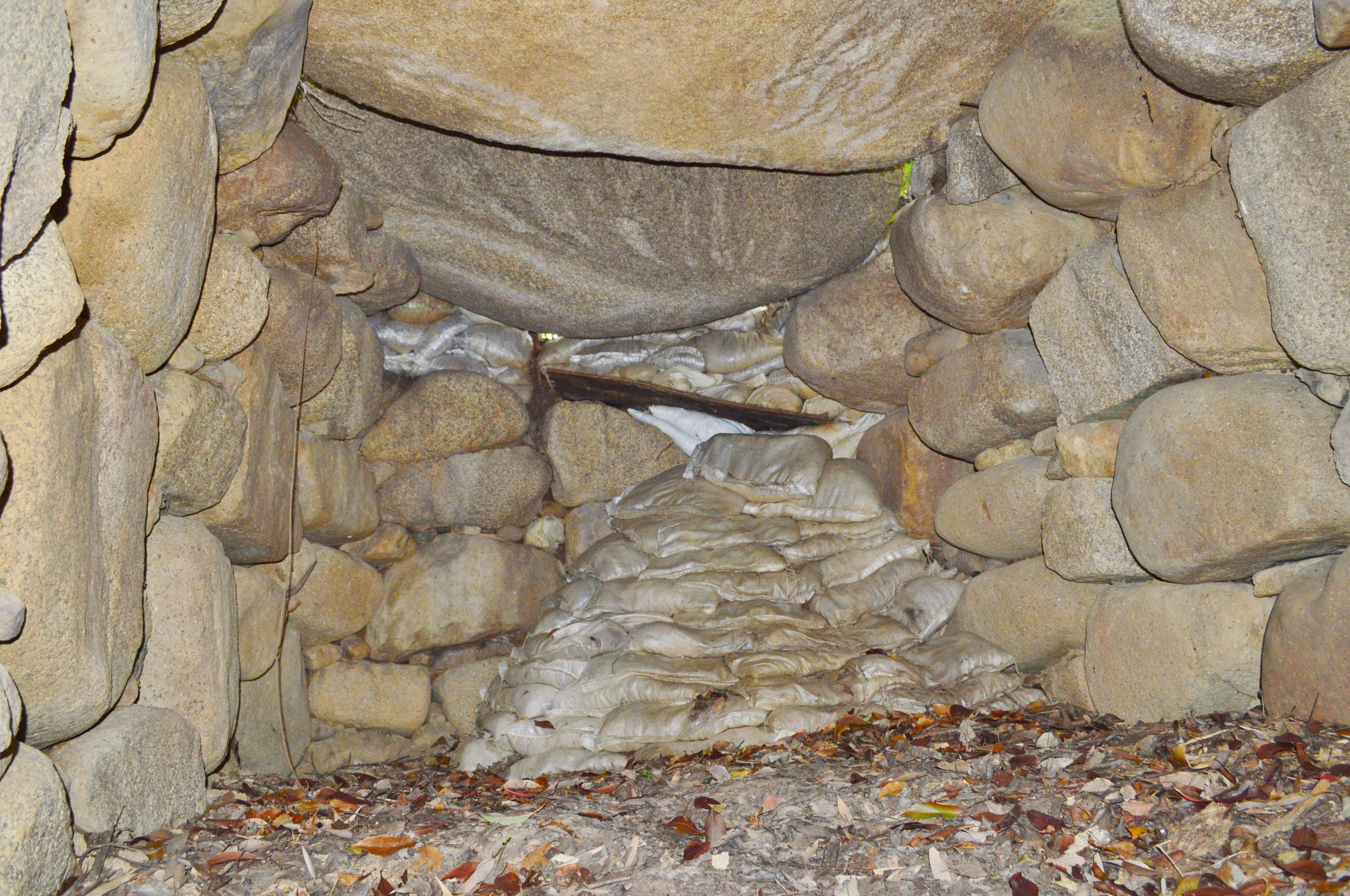 青松塚古墳 石室玄室